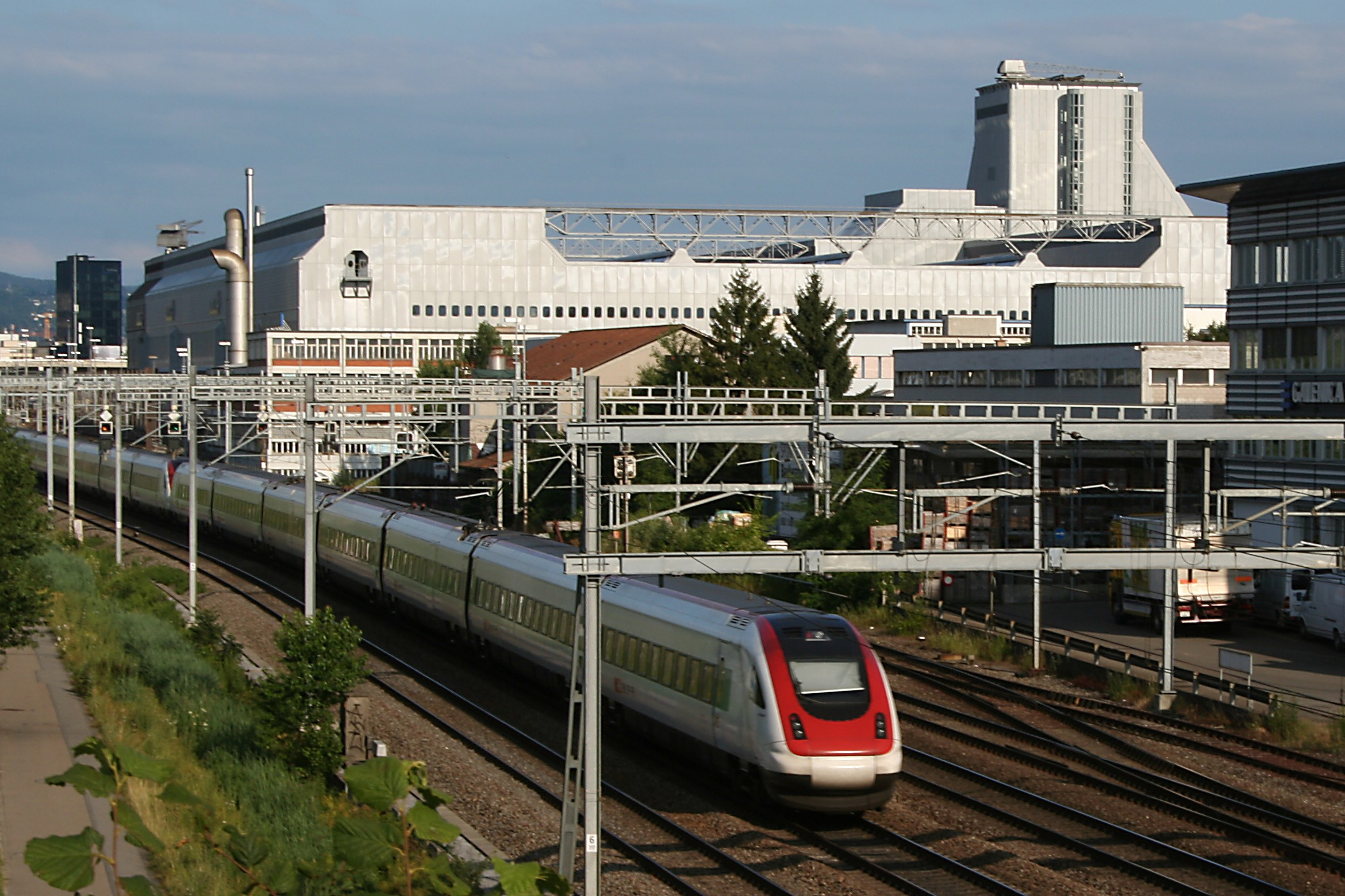 Ehemaliges Paketzentrum und künftiges (ab 2006) grosses Briefzentrum der Schweizerischen Post in Zürich Mülligen, Schweiz. Das Gebäude ist denkmalgeschützt, während dem Umbau soll die Fassade nur marginal verändert werden. Im Vordergrund ein Intercity Neigezug ICN auf der Hauptstrecke Zürich–Bern